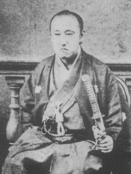 松平定安 Matsudaira Sadayasu.名刺判写真。